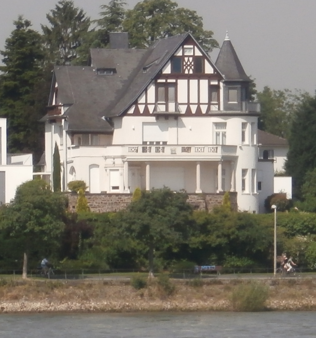 Villa von Meier, Dollendorfer Straße 10, Bad Godesberg: Rheinseite